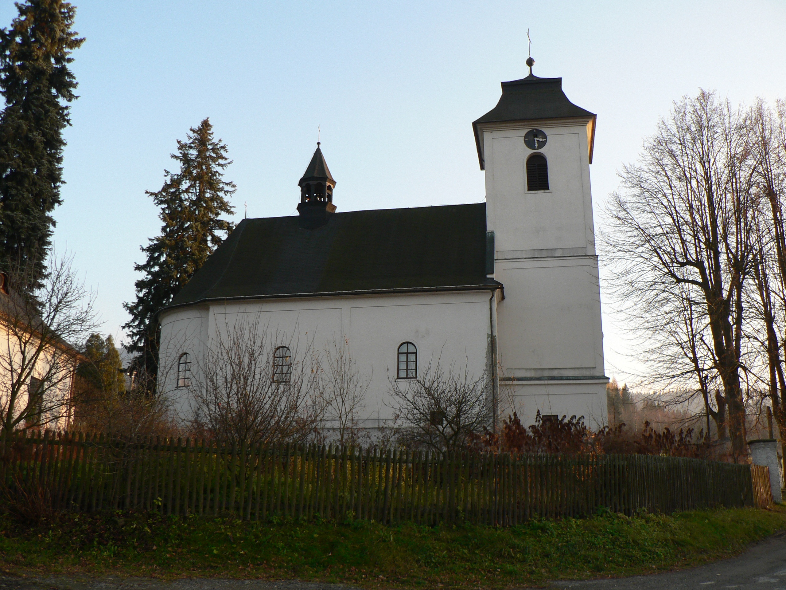 Kostel svatého Filipa a Jakuba (Hraběšice)